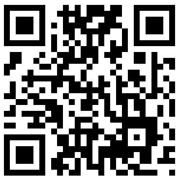 QR code example